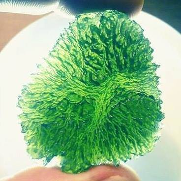 Vltavín